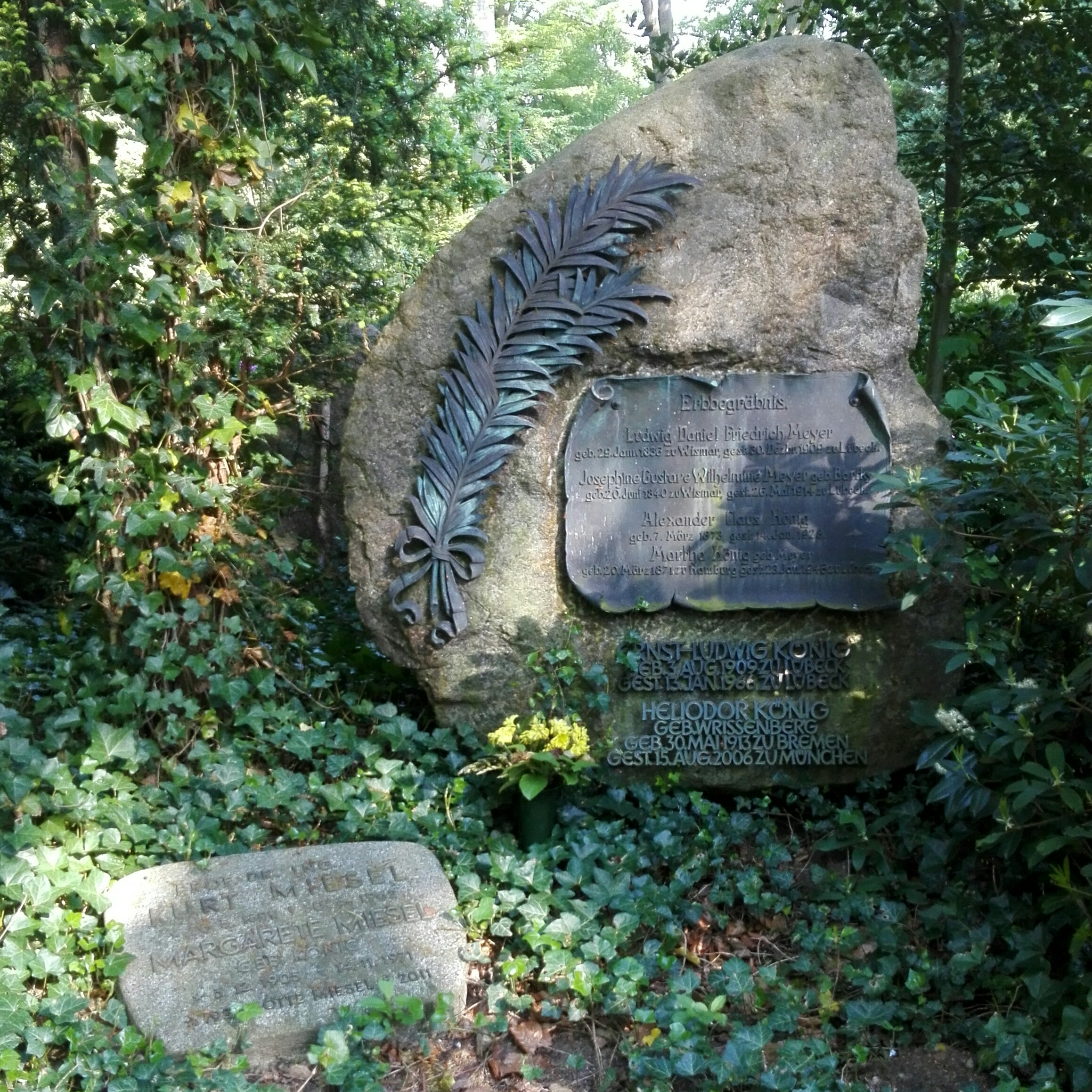 Familiengrab der Familie König auf dem Burgtorfriedhof.